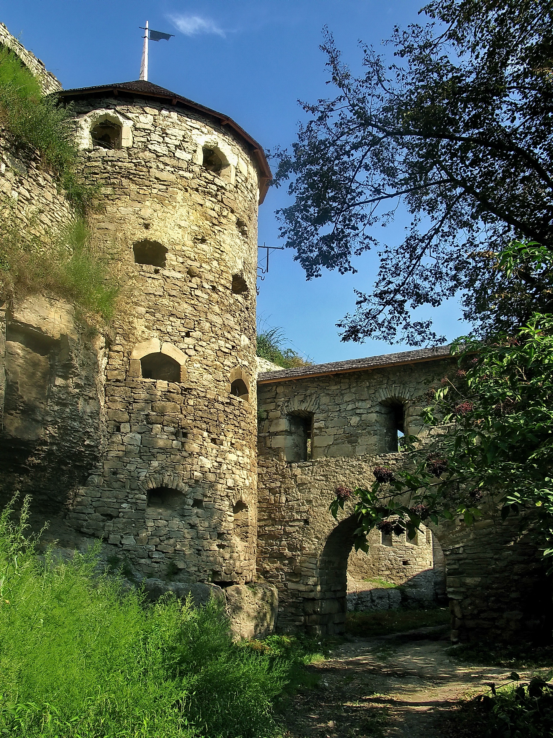 Прибрамна башта, Кам'янець-Подільський, вул.Руська,93